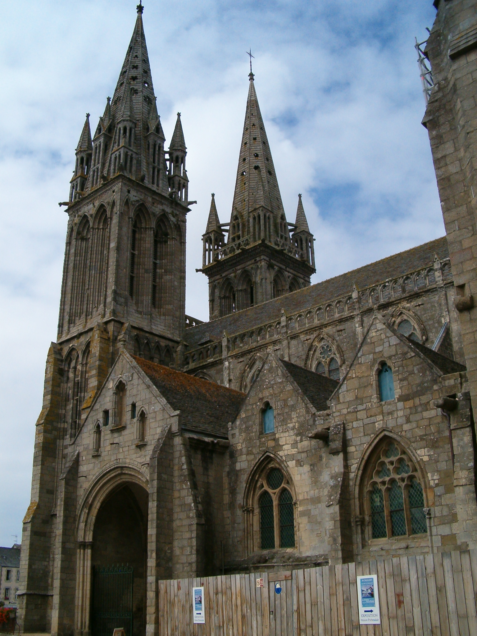 Extérieur de la Cathédrale de Saint-Pol-de-Léon